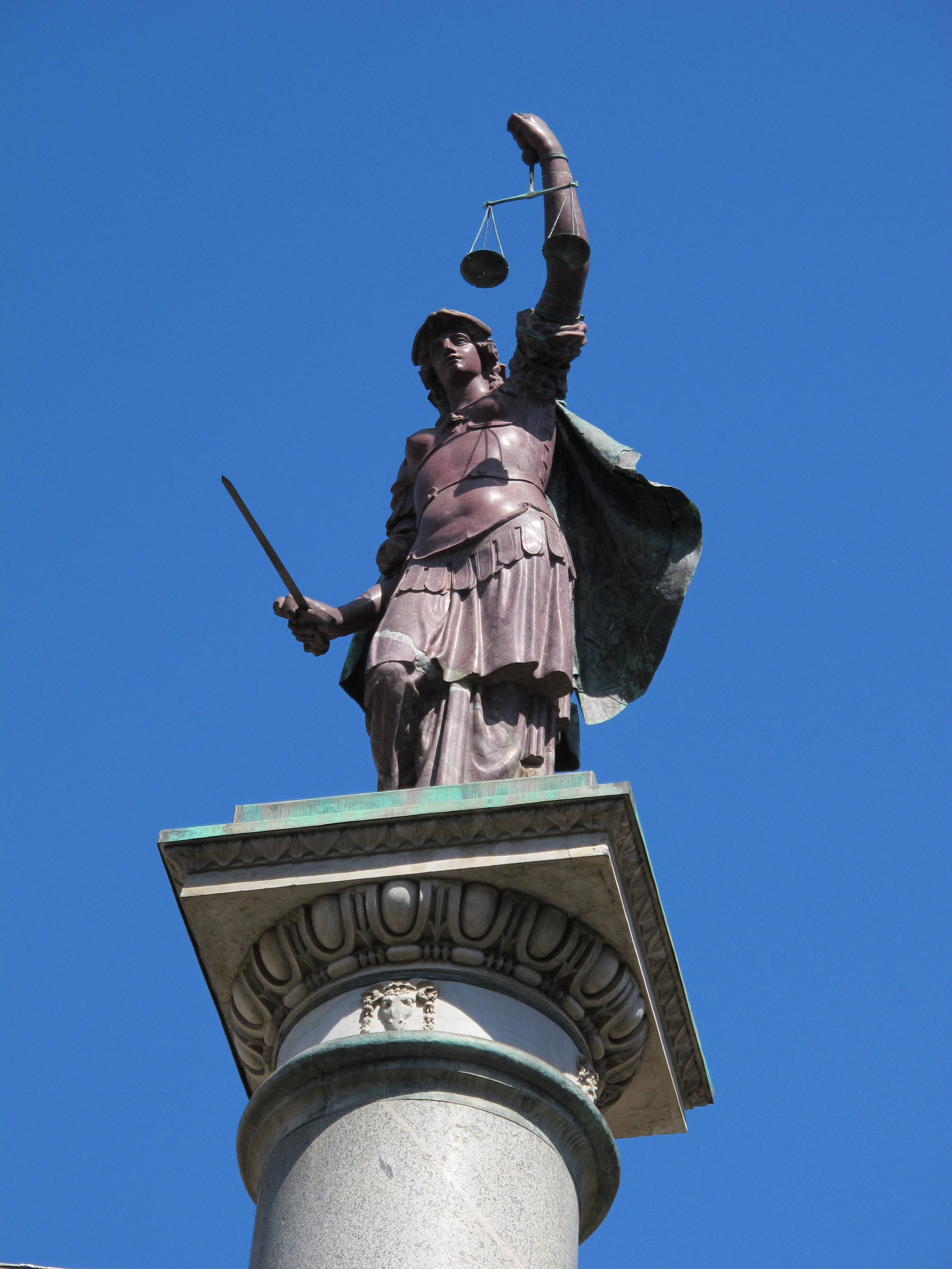 Statua della giustizia, francesco e romolo del tadda